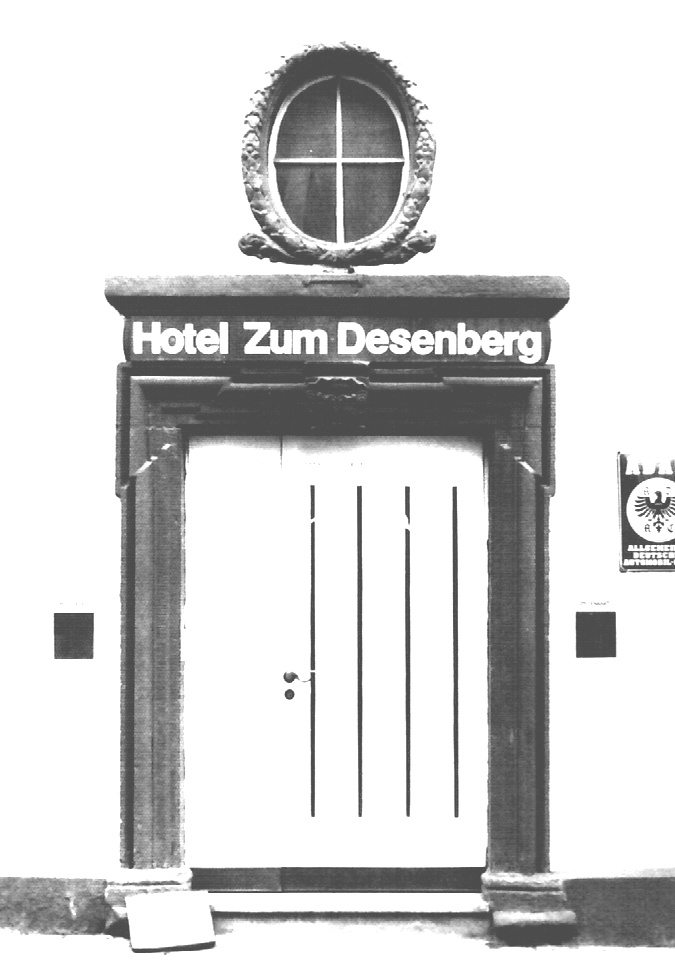 Hotel Zum Desenberg Barockportal 1977